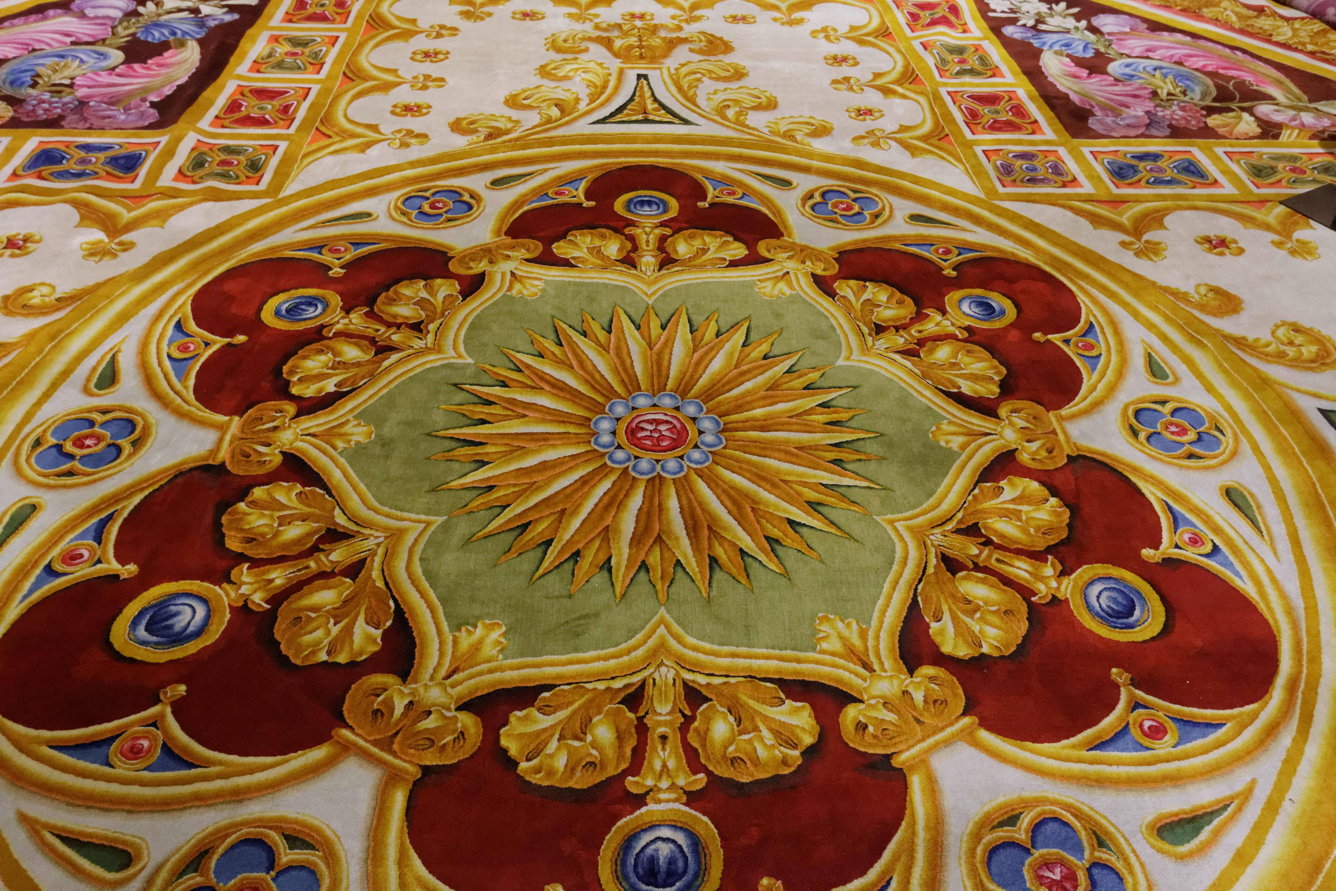 Présentation du tapis monumental de choeur de la cathédrale Notre-Dame de Paris. Il a été tissé de 1825 à 1833 par la manufacture de la Savonnerie. Le centre de la croix aux armes de France fut remplacé par un soleil sur fond vert.